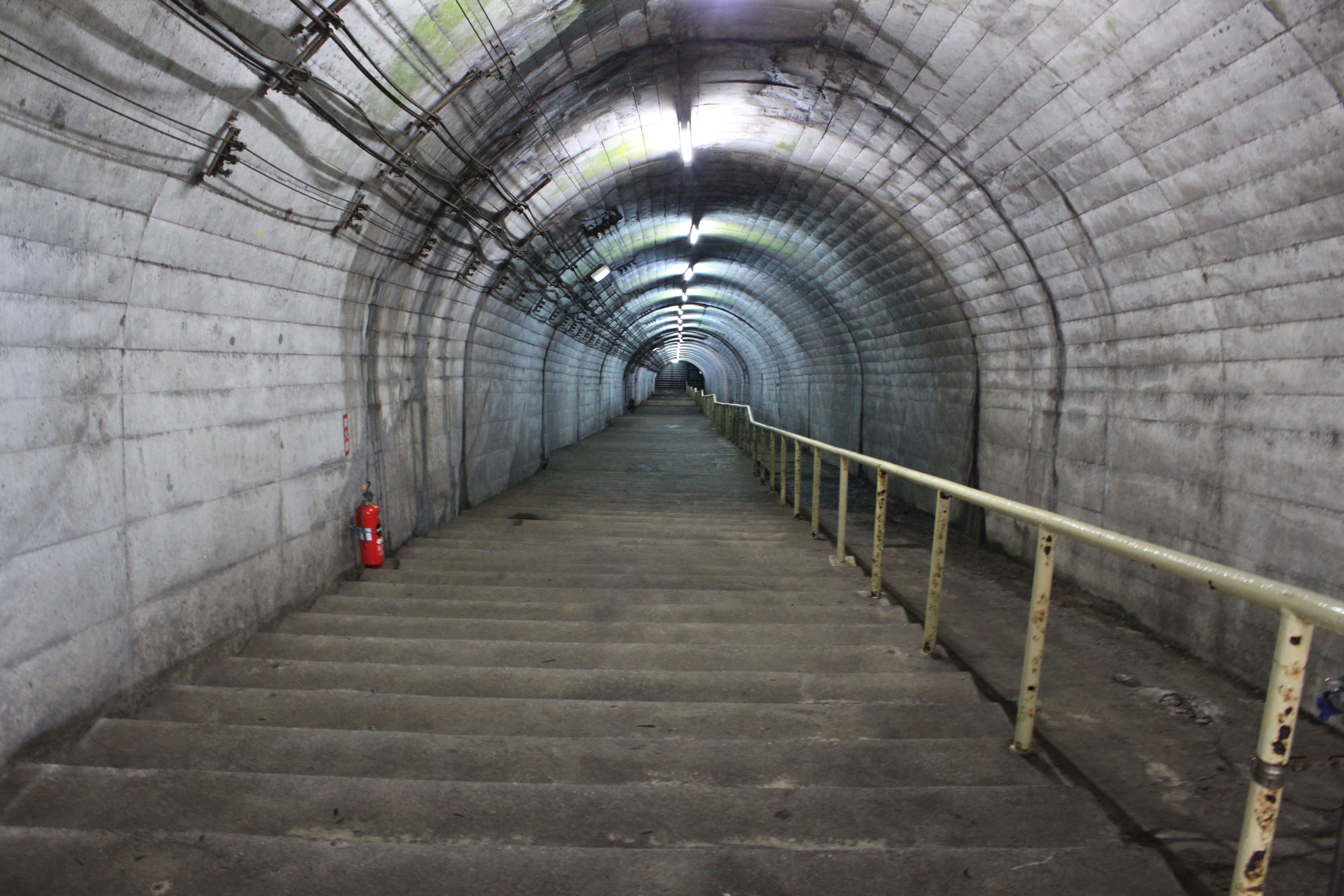 筒石駅